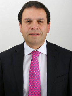 Marcelo Chávez Velásquez